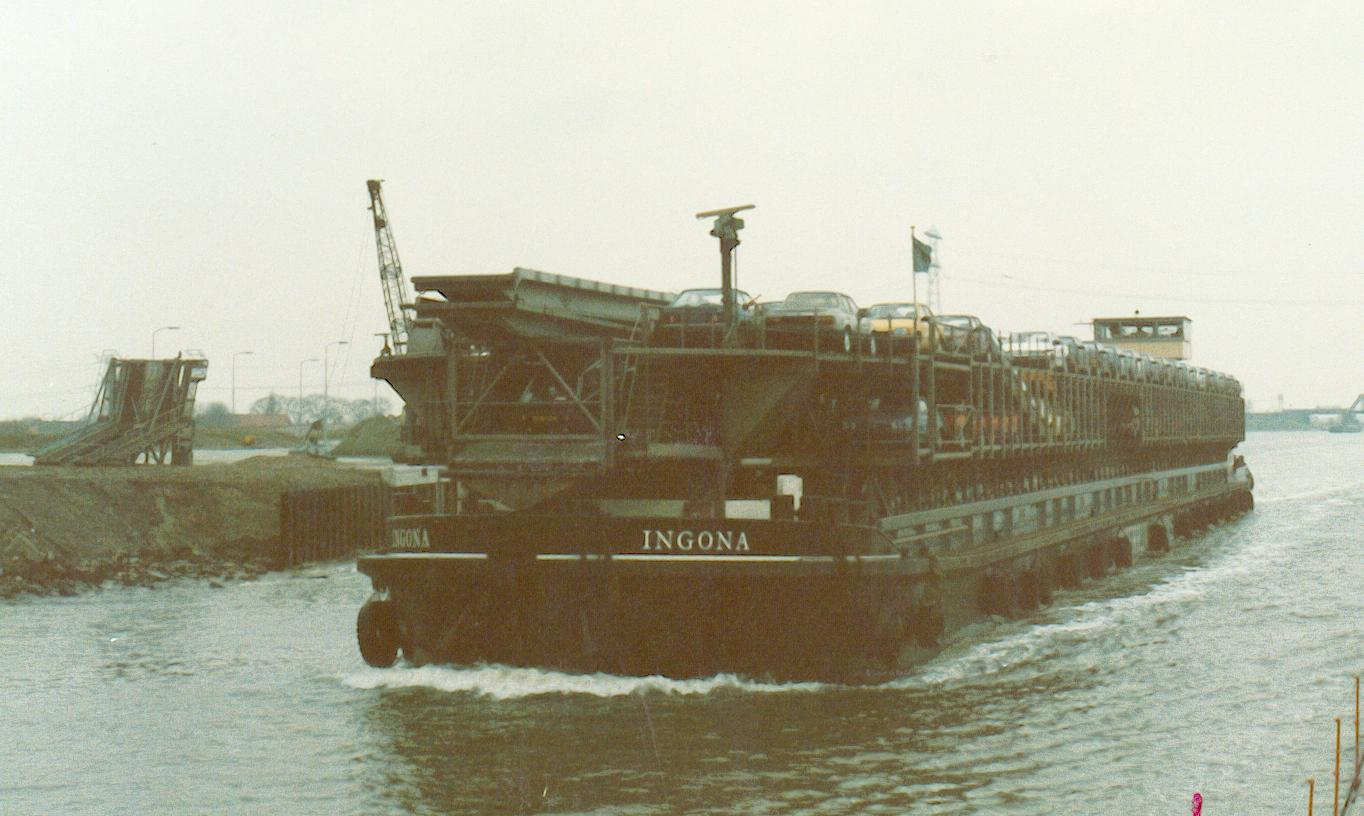 Binnenschiff, Autotransporter Ingona